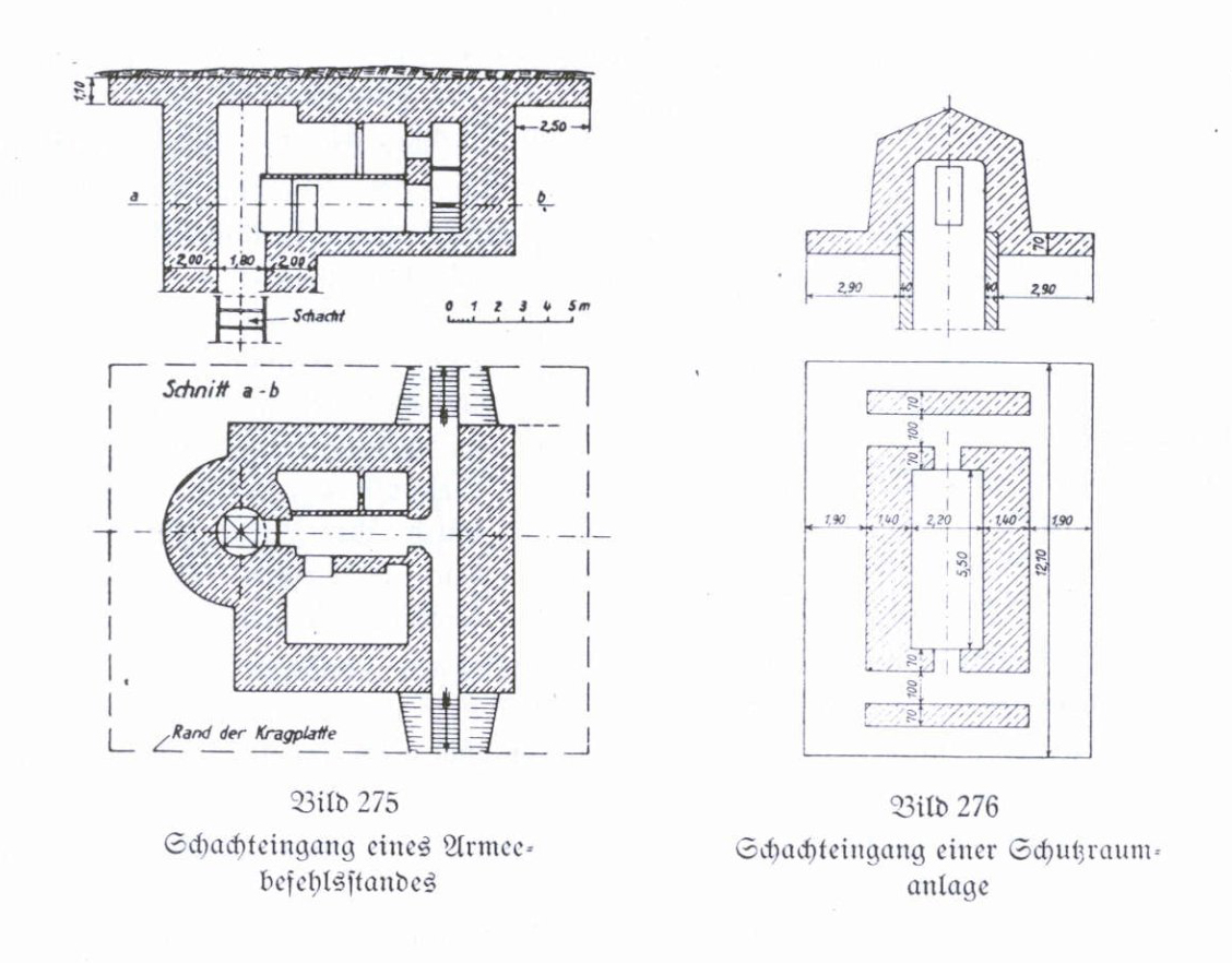 Bild 275, Bild 276